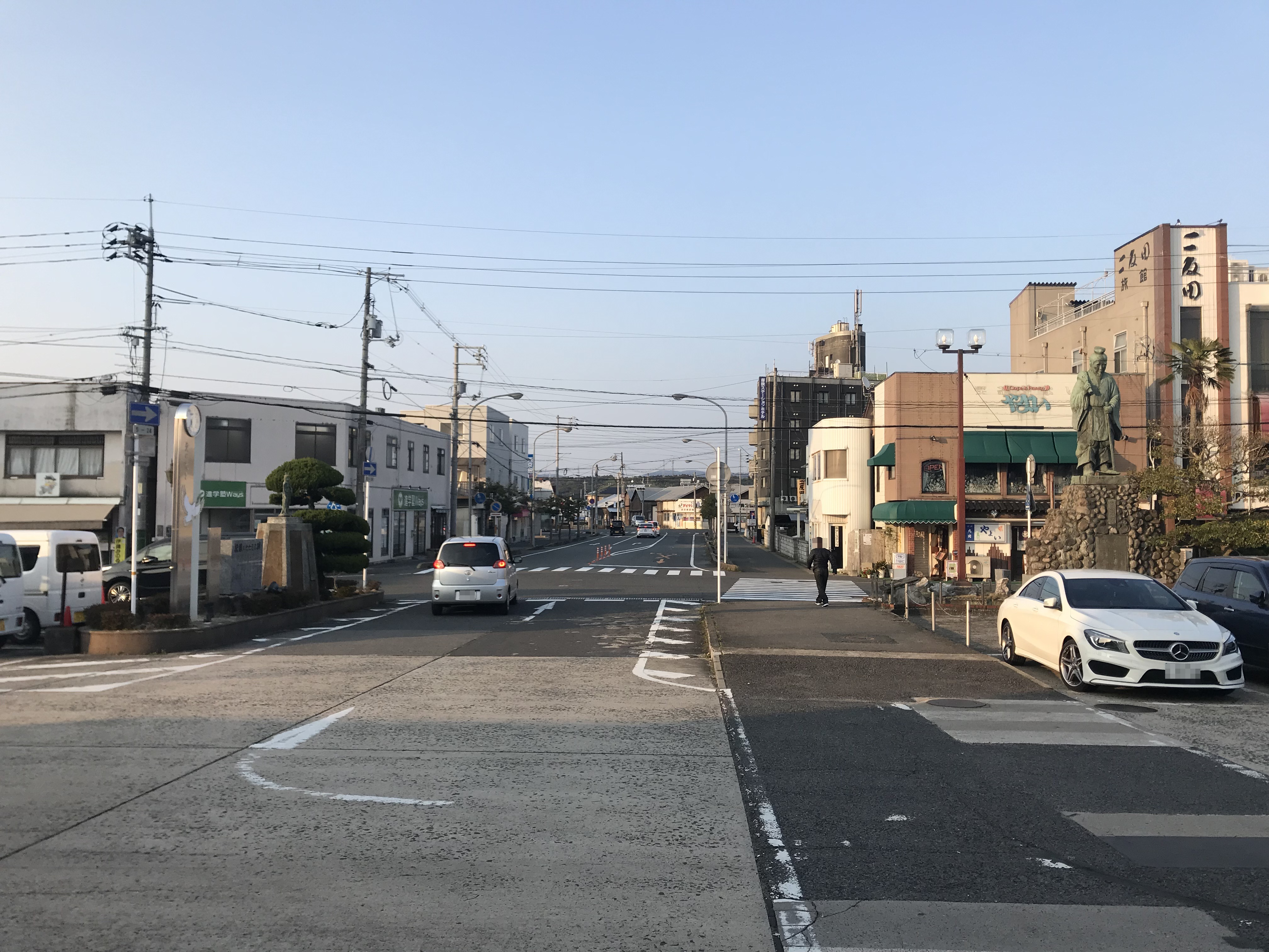 厚狭駅の駅前風景